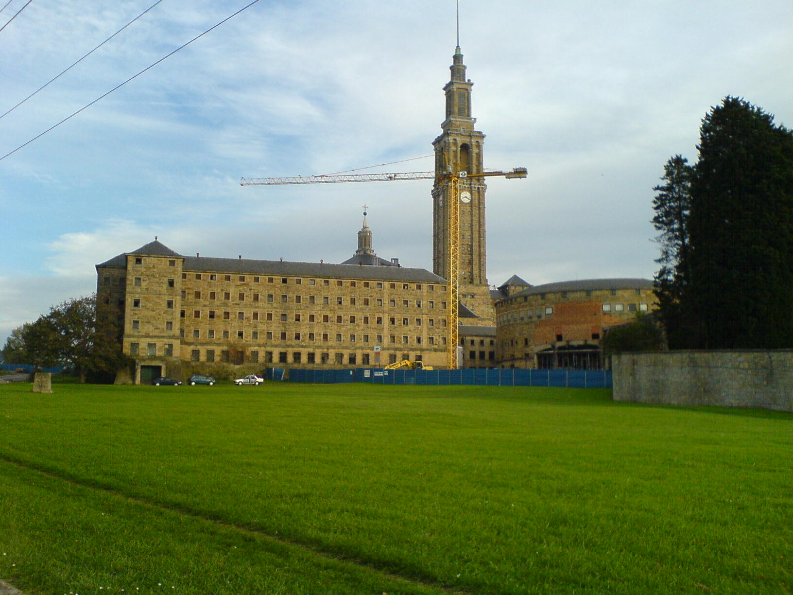 Imagen de la Universidad Laboral de Gijón, España / Image of the Universidad Laboral de Gijón, Spain